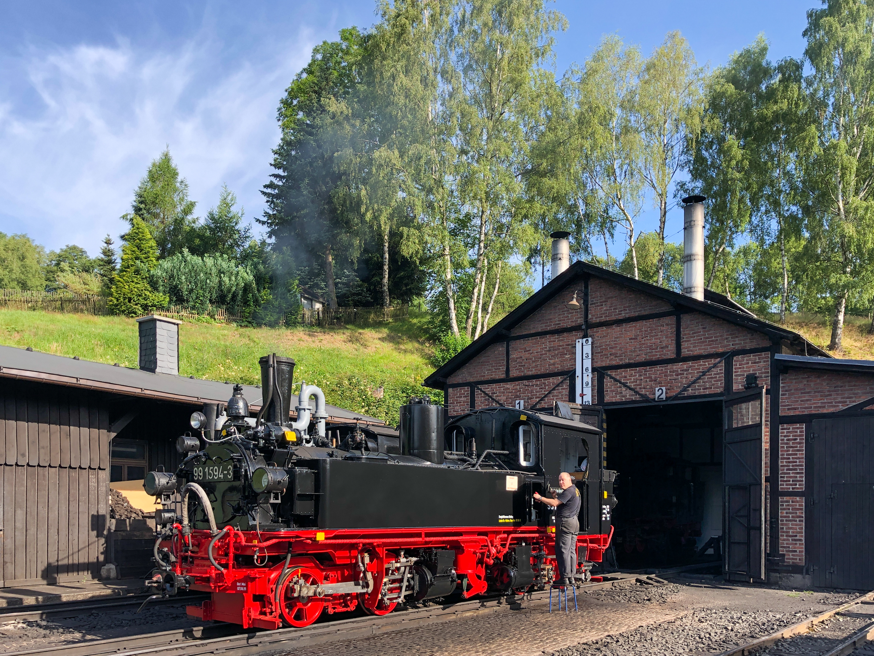 IV K 99 1594-2 vor dem Lokschuppen in Jöhstadt